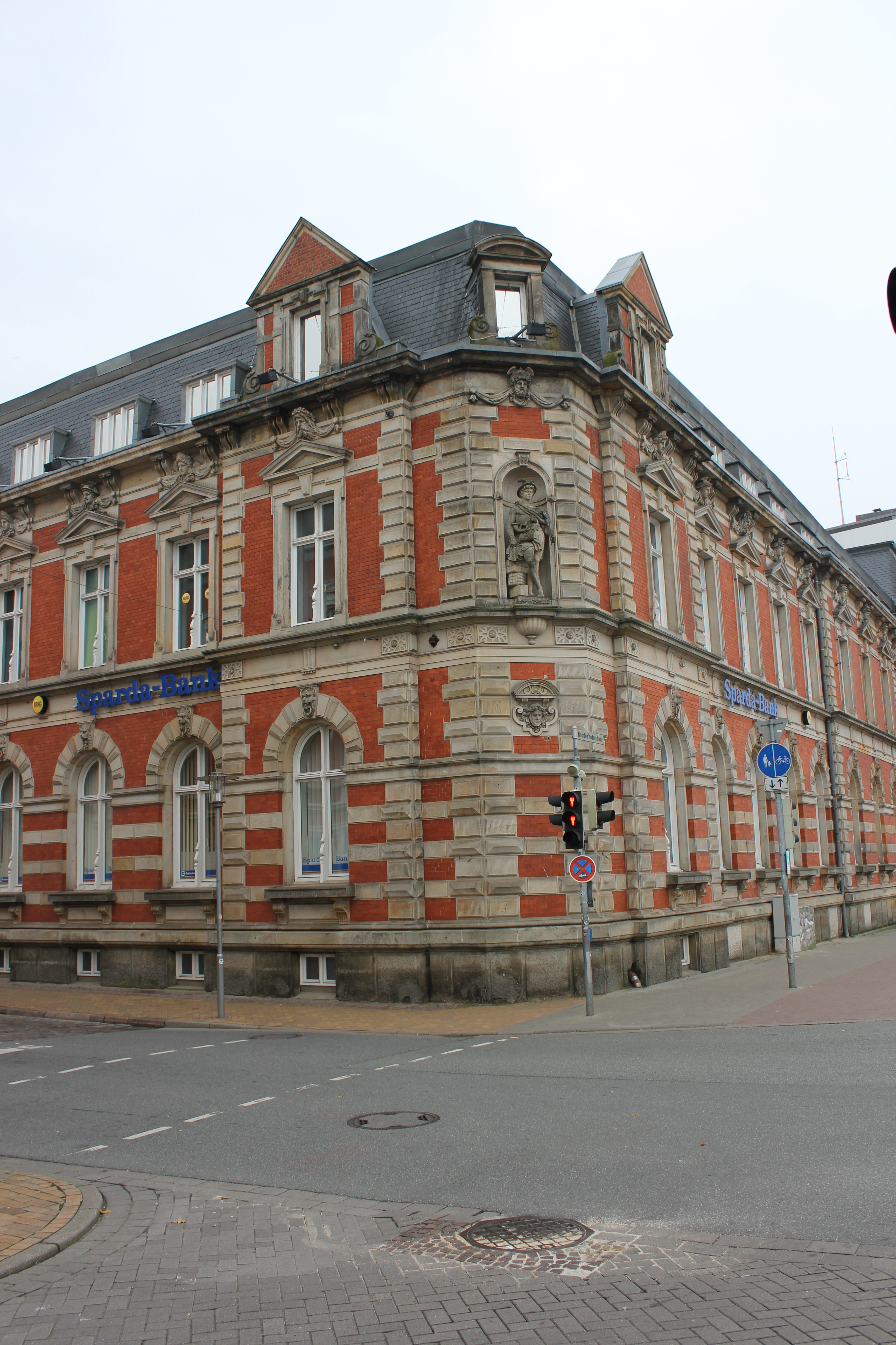 Alte Post Flensburg (Flensburg)